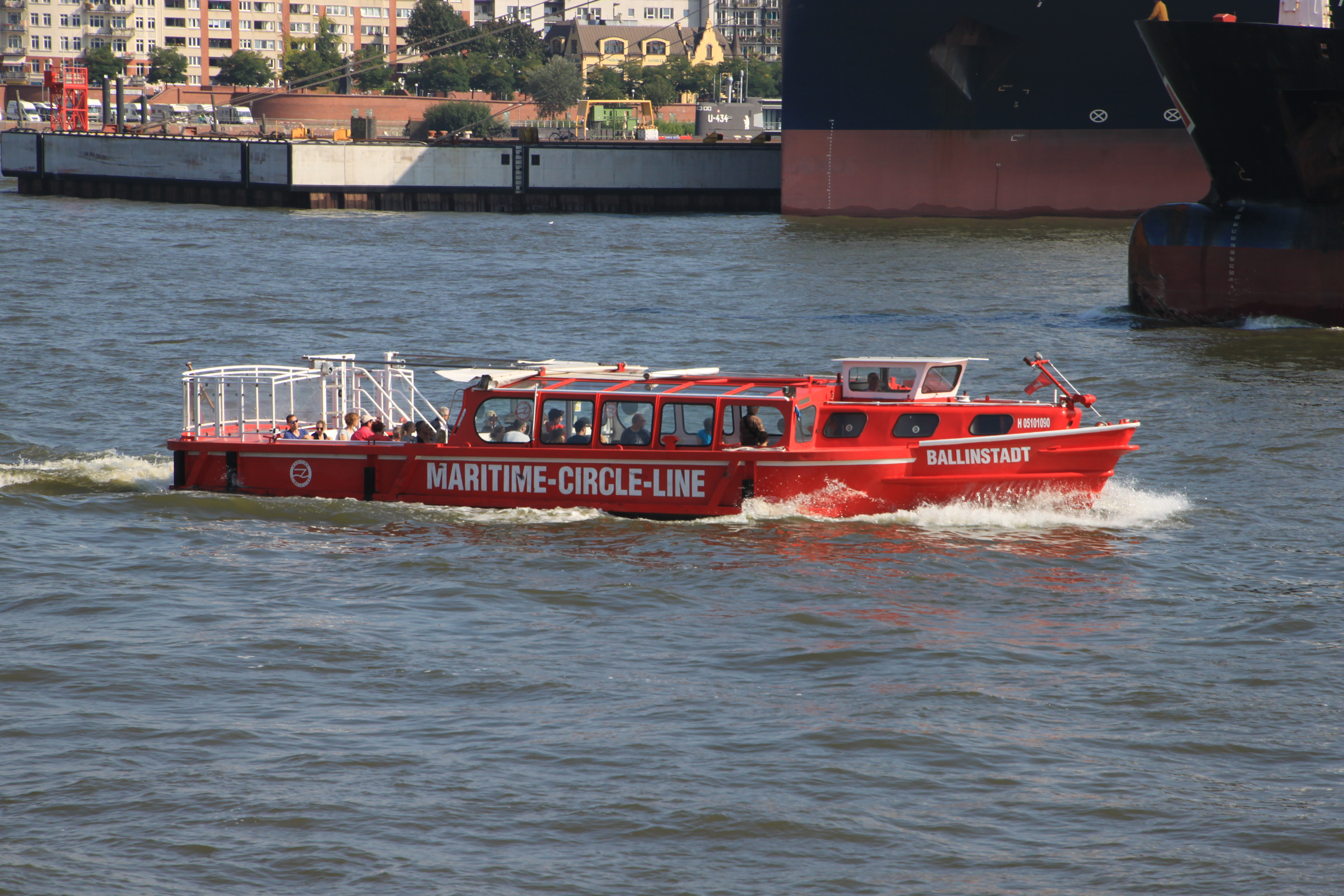 Hafenrundfahrtbarkasse BALLINSTADT im Vorhafen